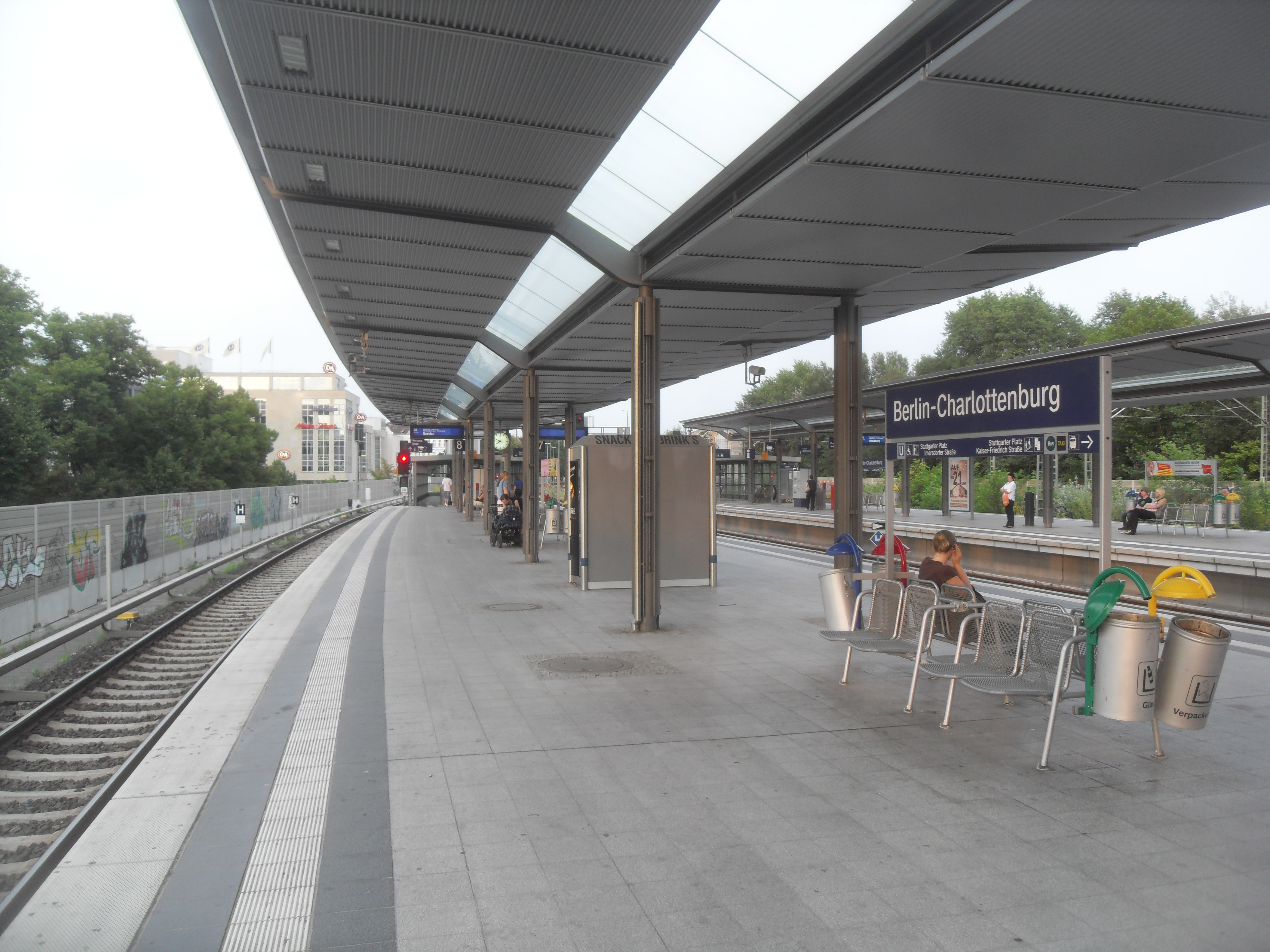 Die Bahnsteige des Bahnhofs Berlin-Charlottenburg